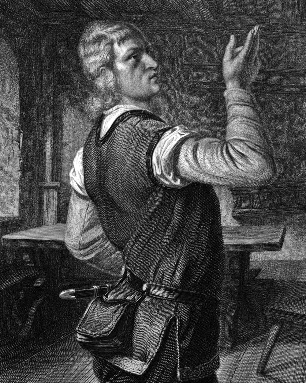 Arnold vom Melchtal aus Friedrich Schillers Schauspiel Wilhelm Tell, als Stahlstich gestochen um 1859 nach einer Zeichnung von Friedrich Pecht